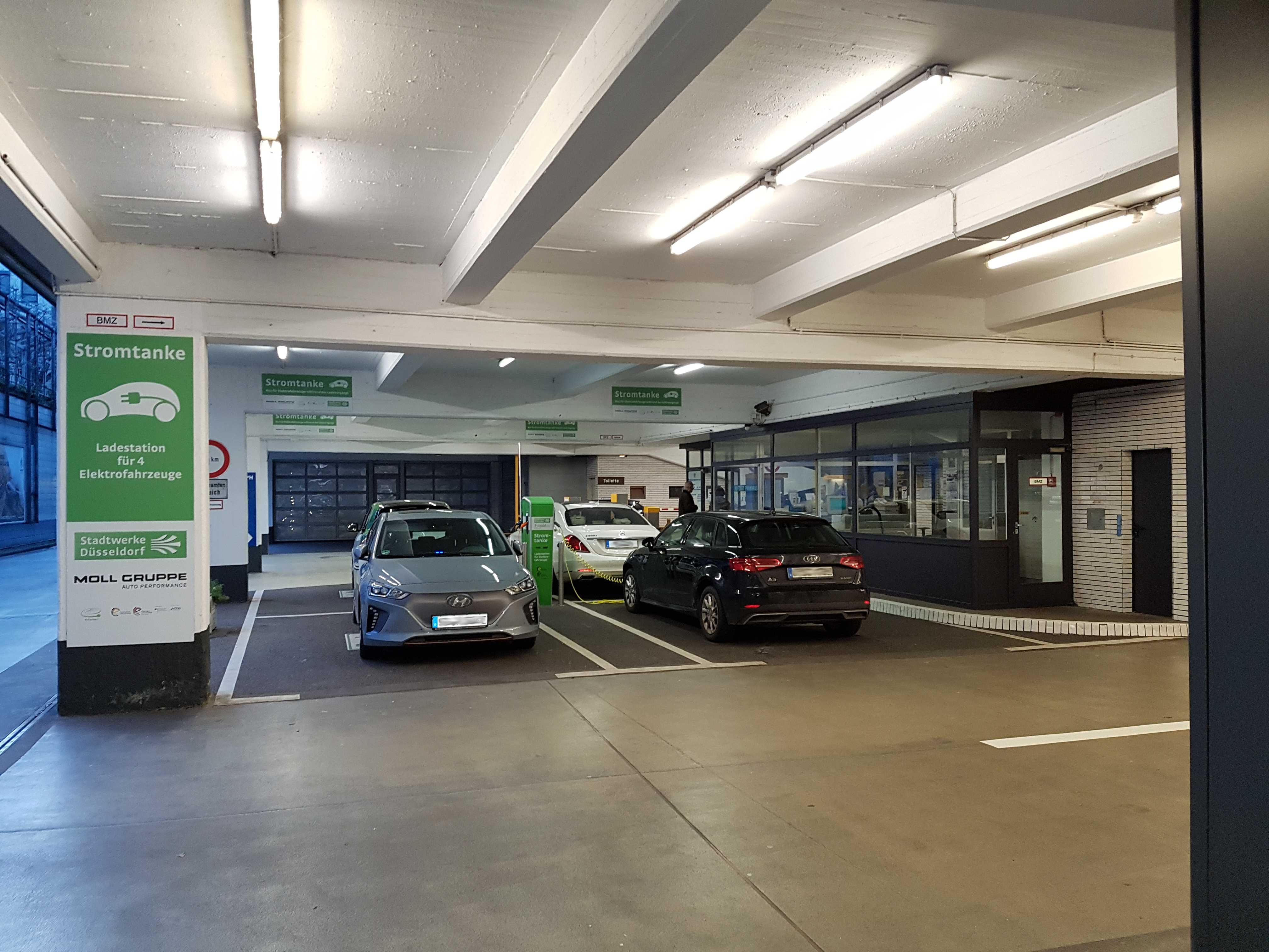 Ladesäule in Düsseldorf Berliner Allee